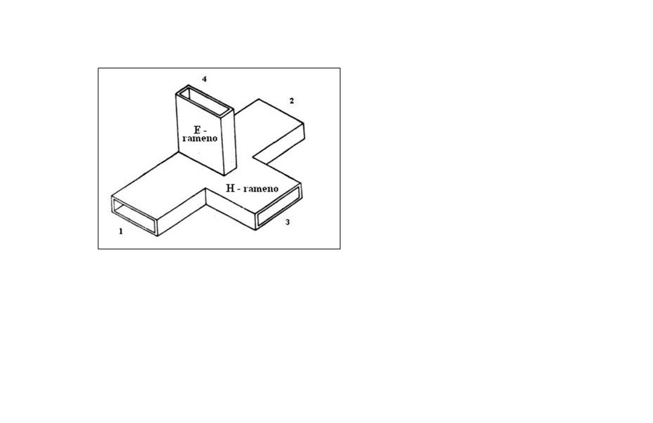 Magické T